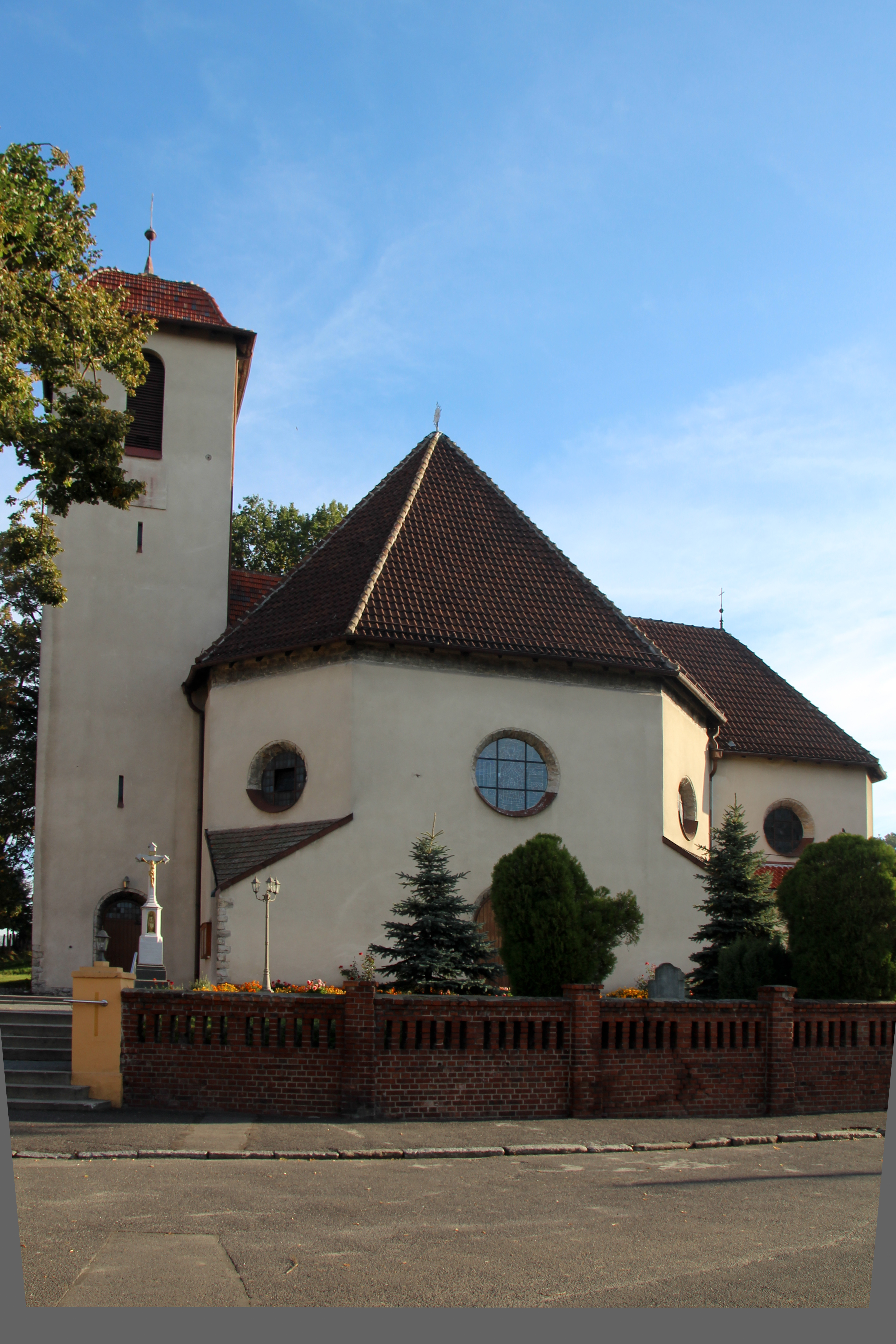 Gierałtowice - kościół rzymskokatolicki p.w. św. Szymona i Judy Tadeusza, 1937.